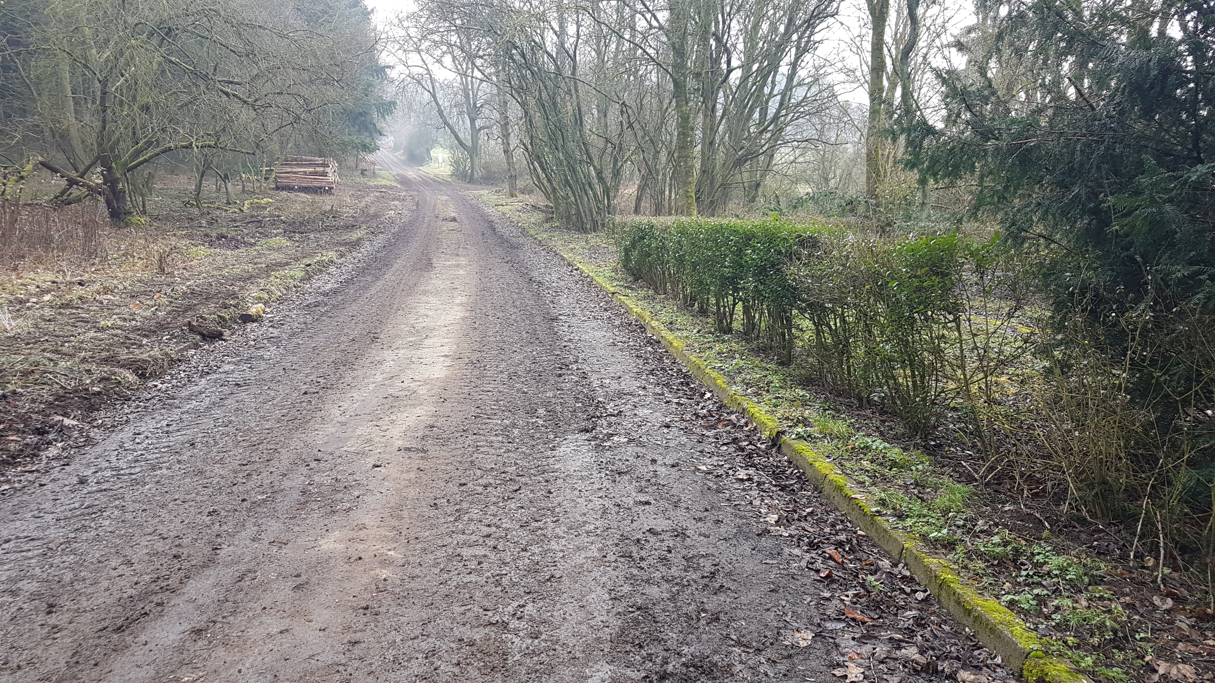 Wüstung Rockenfeld